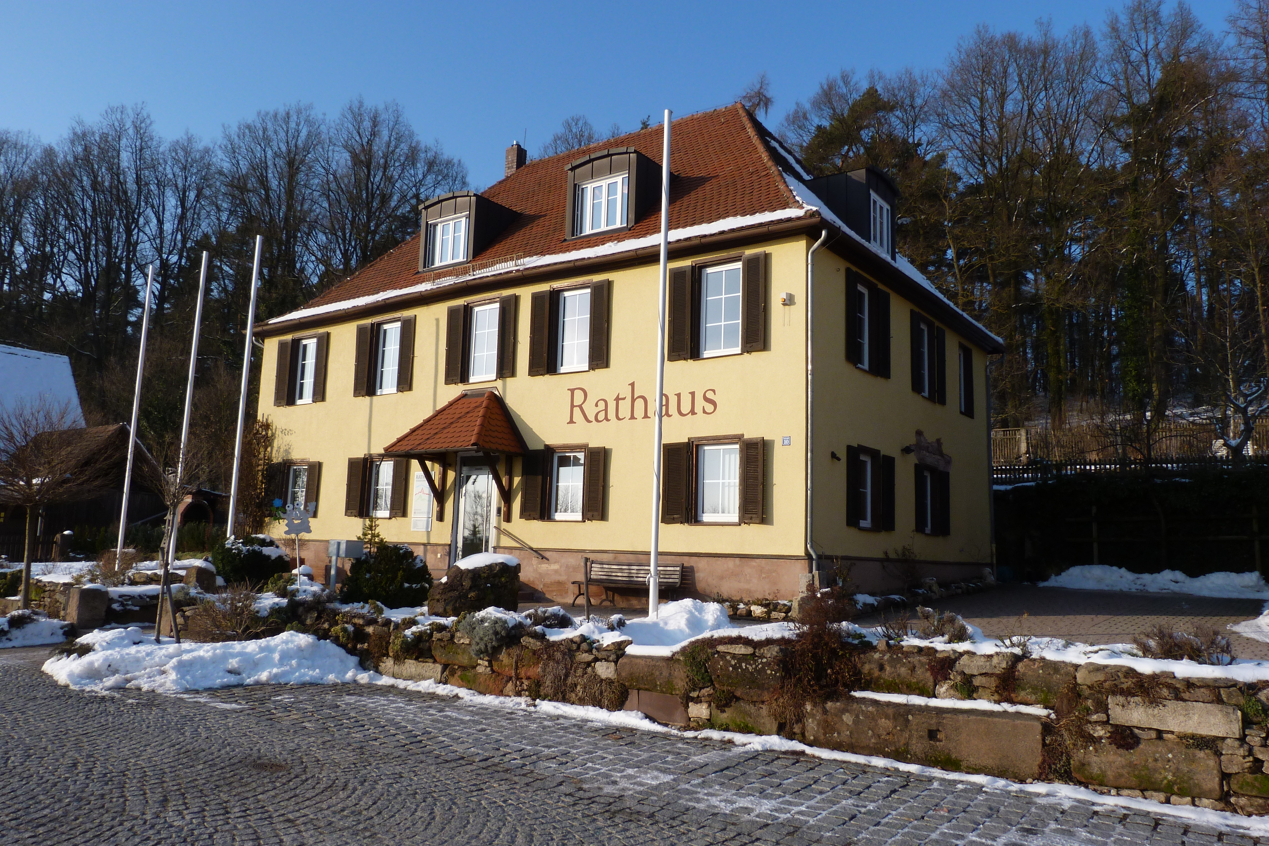 Rathaus von Kammerstein